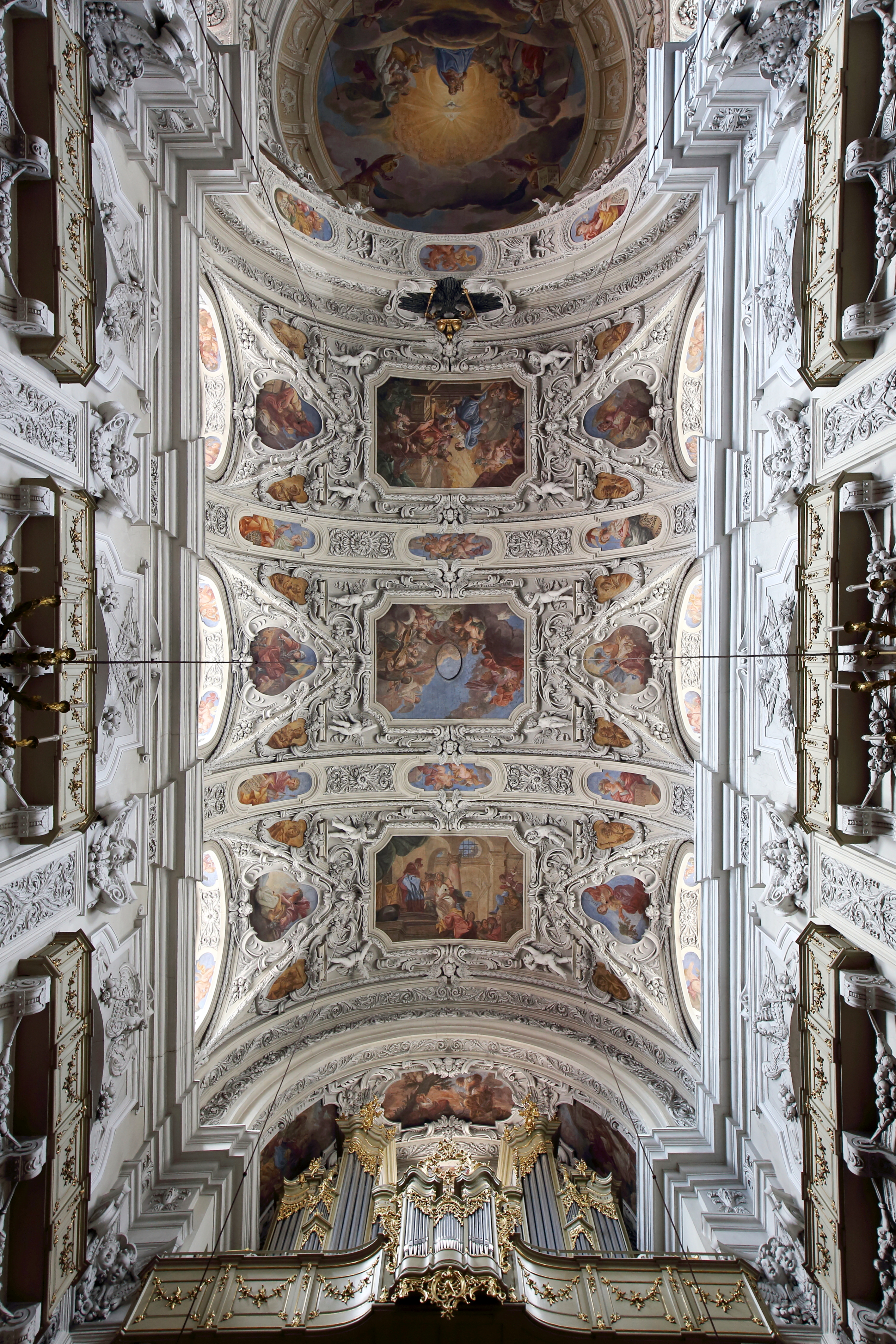 Deckenfreskos mit stark plastischer Stuckdekoration des Langhauses der Dominikanerkirche in der österreichischen Bundeshauptstadt Wien. Die frühbarocken Deckenbilder des Langhauses schuf laut Vertrag vom 18. März 1675 Matthias Rauchmüller. In insgesamt 46 Bildern entfaltet sich ein breiter Bilderbogen zur marianischen Thematik. Die 3 Hauptbilder stellen Vermählung Mariens, Braut des Heiligen Geistes und Mariä Opferung dar.